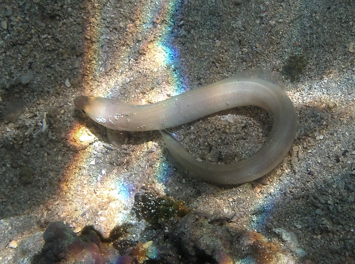 Un congre de sable argenté (Ariosoma anago) juvénile à la Réunion.